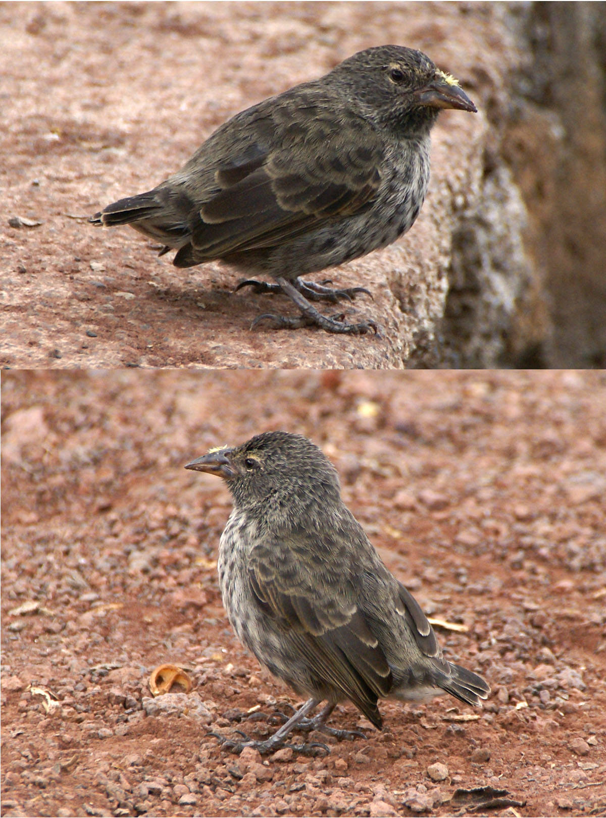 Geospiza scandens